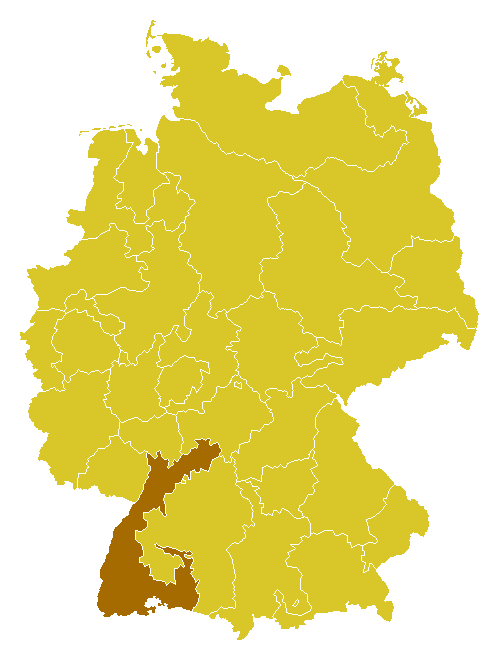 Beschreibung: Katholische Diözese/Bistum in Deutschland